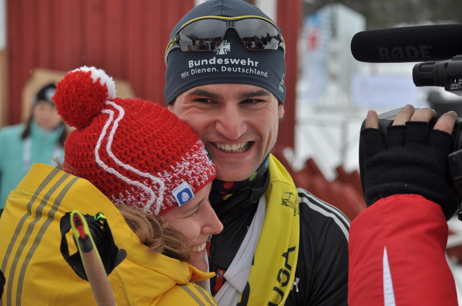 Florian Schillinger et Vivian Hösch après leurs médailles de bronze aux championnats du monde 2015 à Cable (USA)